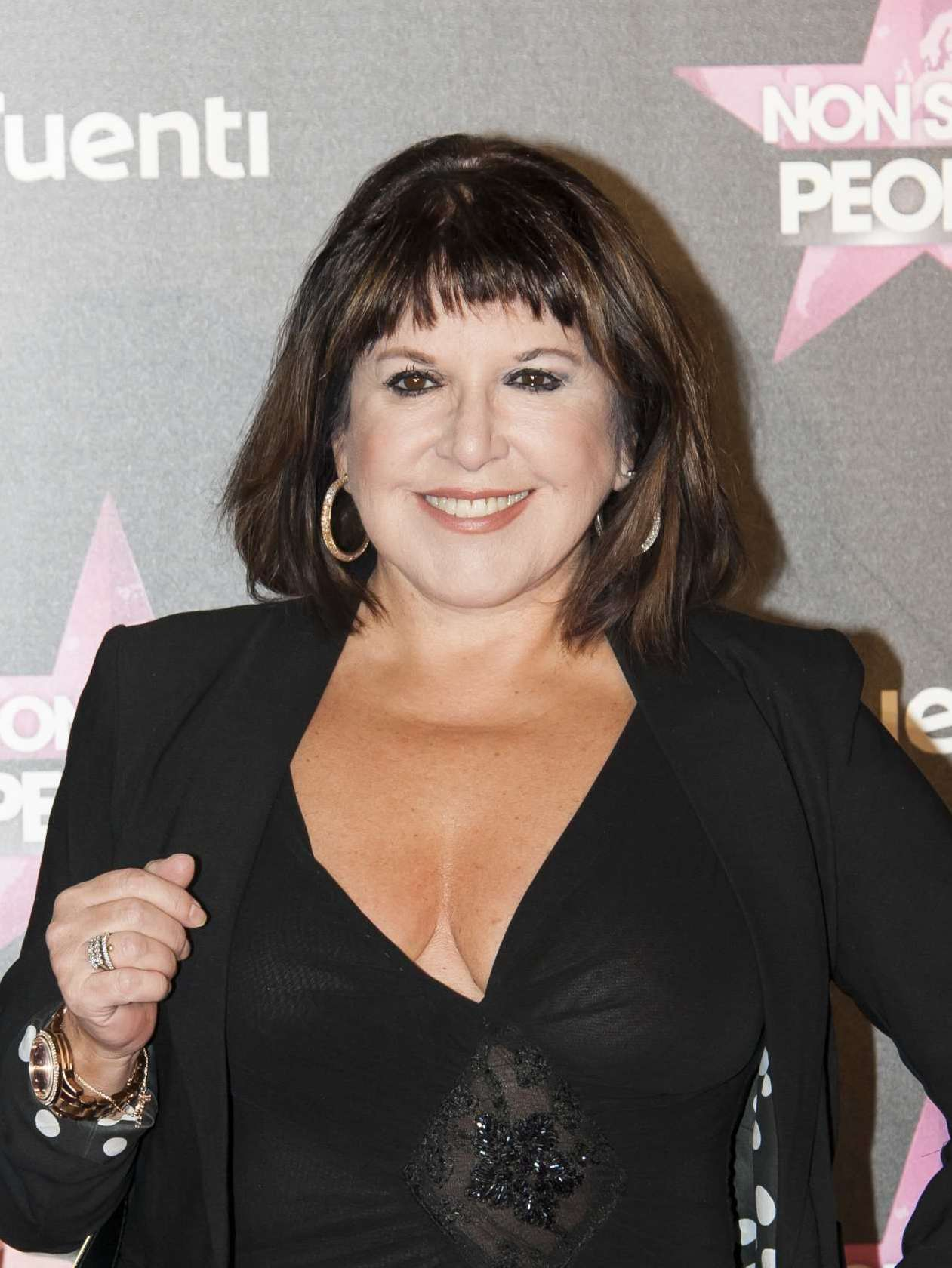 Fotos del photocall y fiesta de lanzamiento de un nuevo canal de televisión en España.